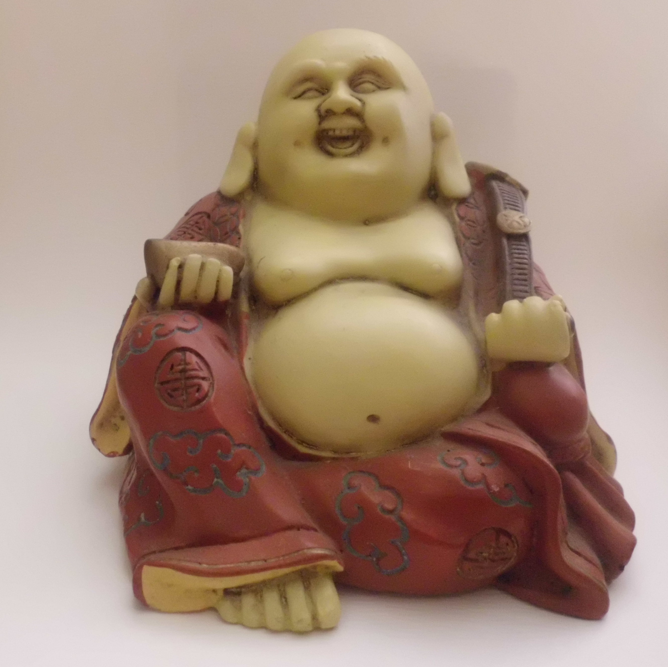 Fotografía de un "Buda gordo" que he tomado con mi cámara digital CASIO EXILIM (14.1 MP 26 mm) la mañana del 13 de enero de 2017. Posteriormente, la he recortado con Picasa 3.